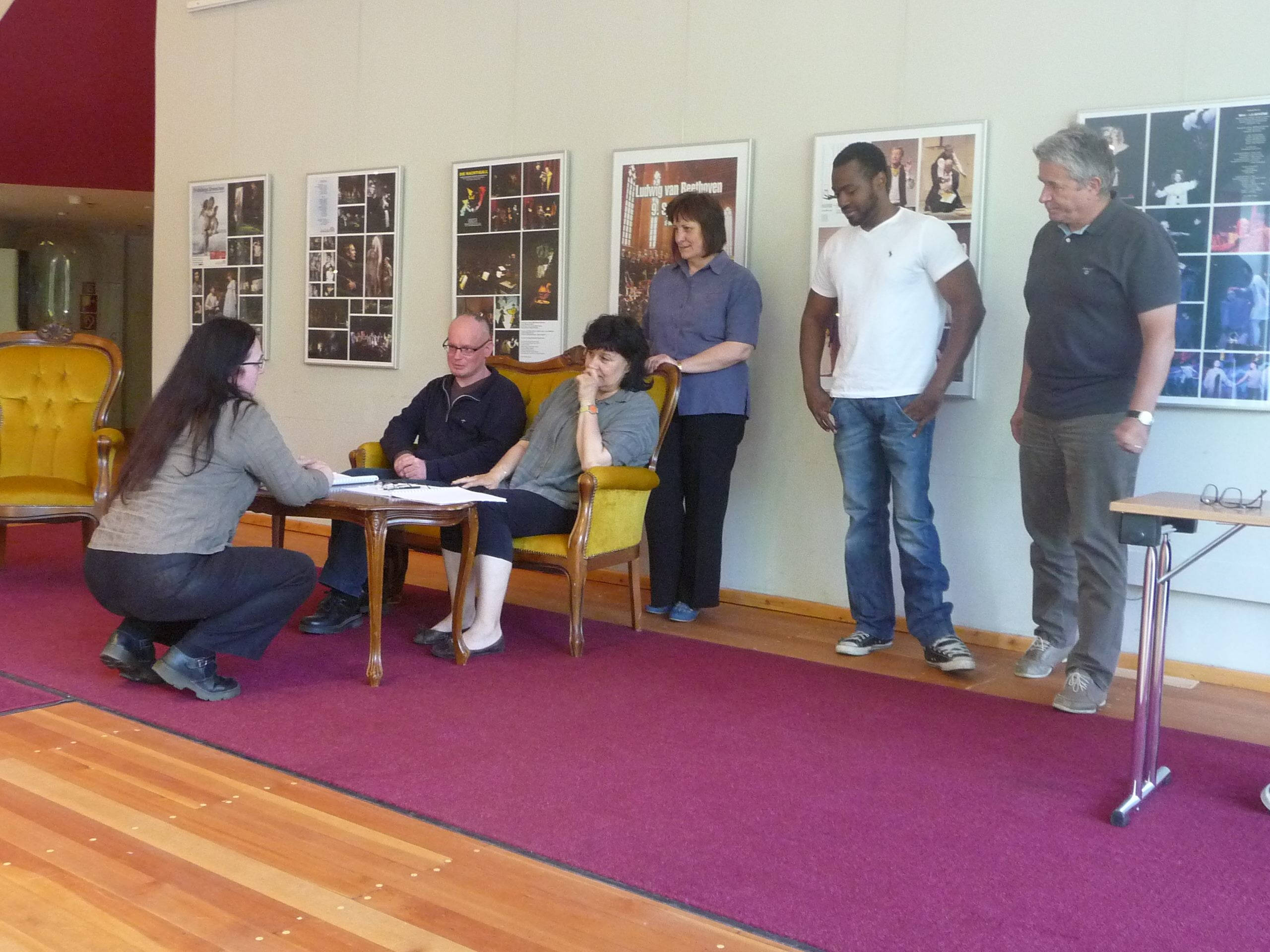 Probe der Amateurtheatergruppe am Brandenburger Theater in Foyer des CulturCongressCentrums unter Leitung von Heike Katzwinkel (links); Juni 2015